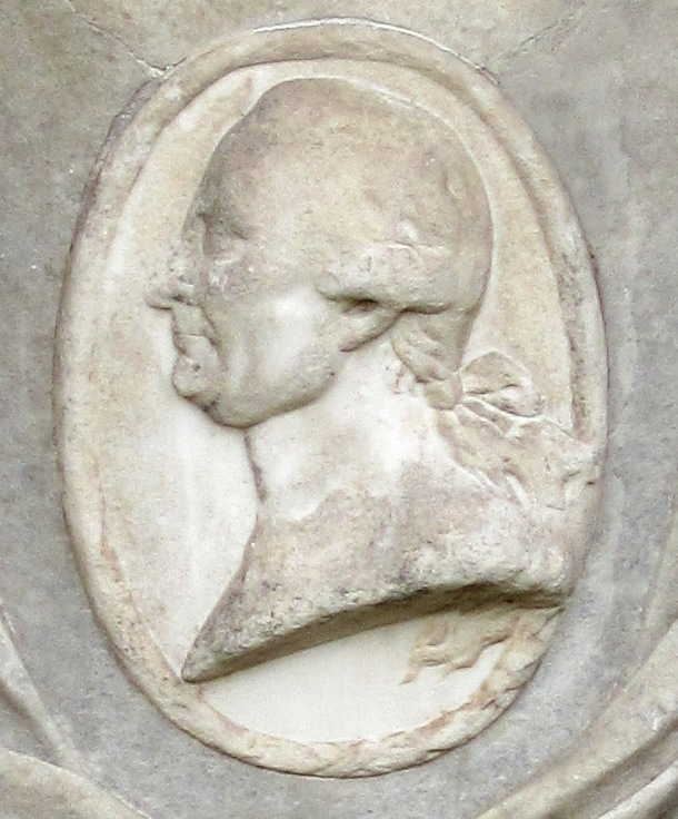 Hans Siegismund von Lestwitz (1718–1788) von Johann Gottfried Schadow